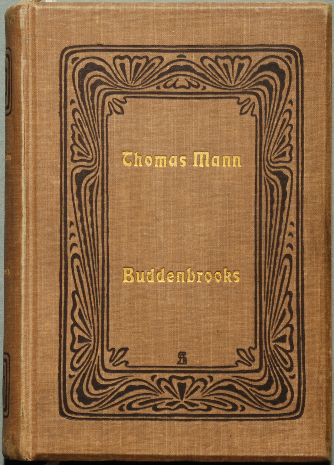 Mann, Thomas: Buddenbrooks. Verfall einer Familie. 2 Bände Berlin: S. Fischer 1901, 566 Seiten, 339 Seiten; Georg Potempa